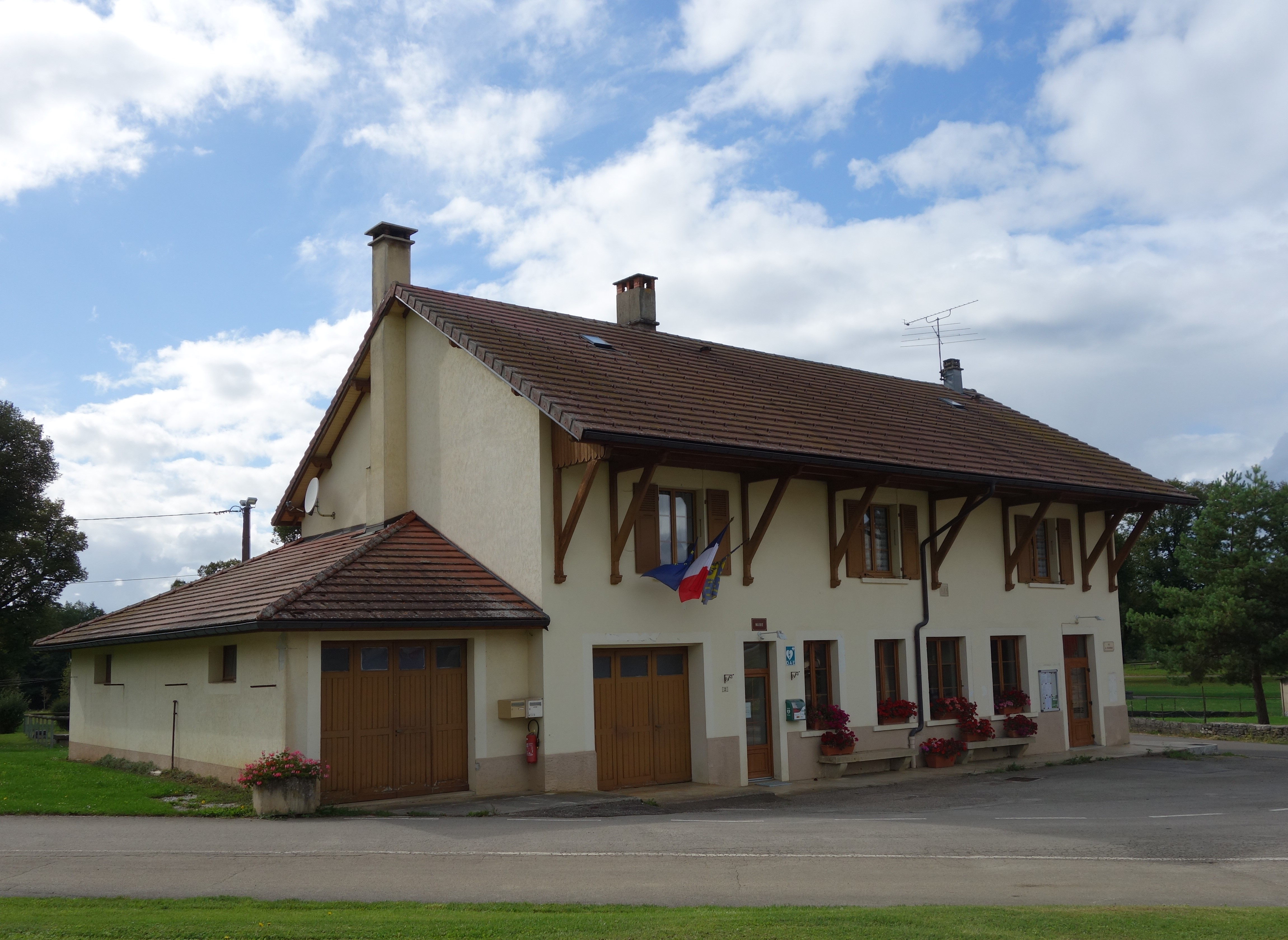 Uxelles - Mairie - Jura